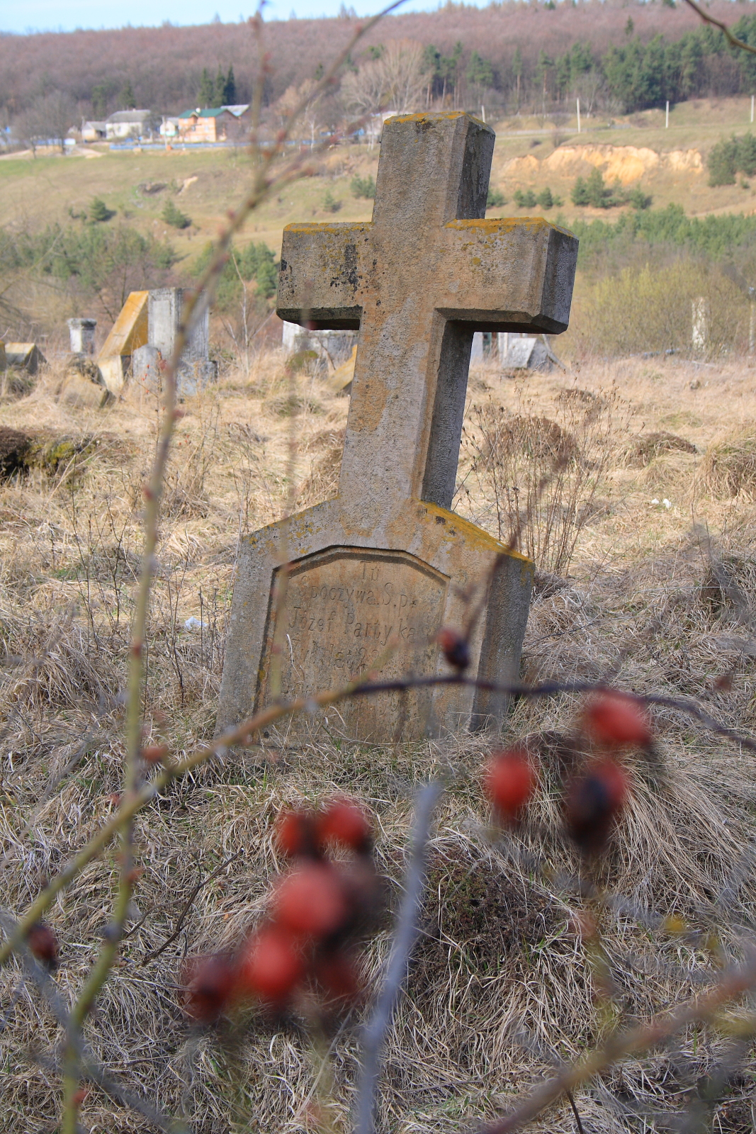 Микулинці